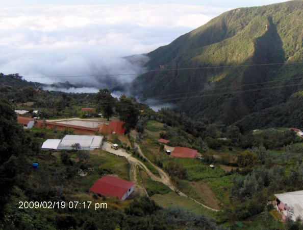 Galipan en Parque Nacional El Avila, Estado Vargas - Venezuela